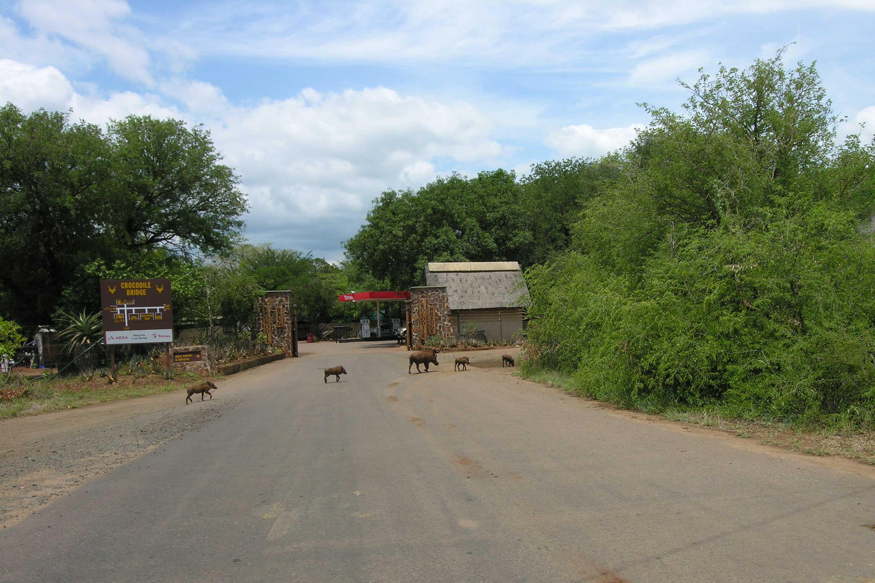 Crocodile Bridge camp gate